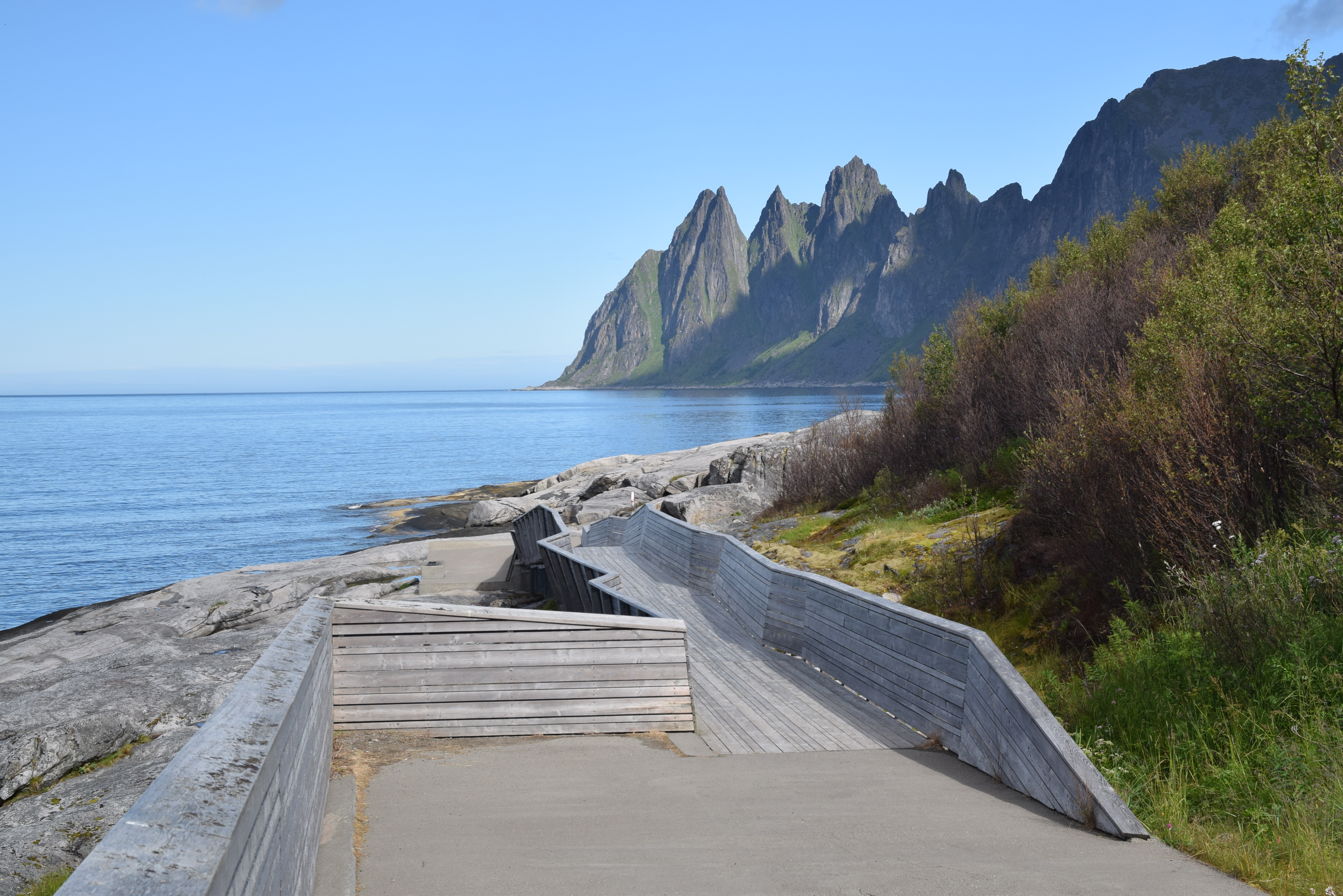 Tungeneset utsiktspunkt, mellom Steinfjorden og Ersfjord, del av Nasjonale turistveger, Berg kommune, Senja. Sett mot Okshornan og nordvest. Utsiktspunktet med 110 meter lang rampe ferdig 2008, Code Arkitekter og Aurora landskap for Statens vegvesen (Arkitektur N 01/09 side 54).